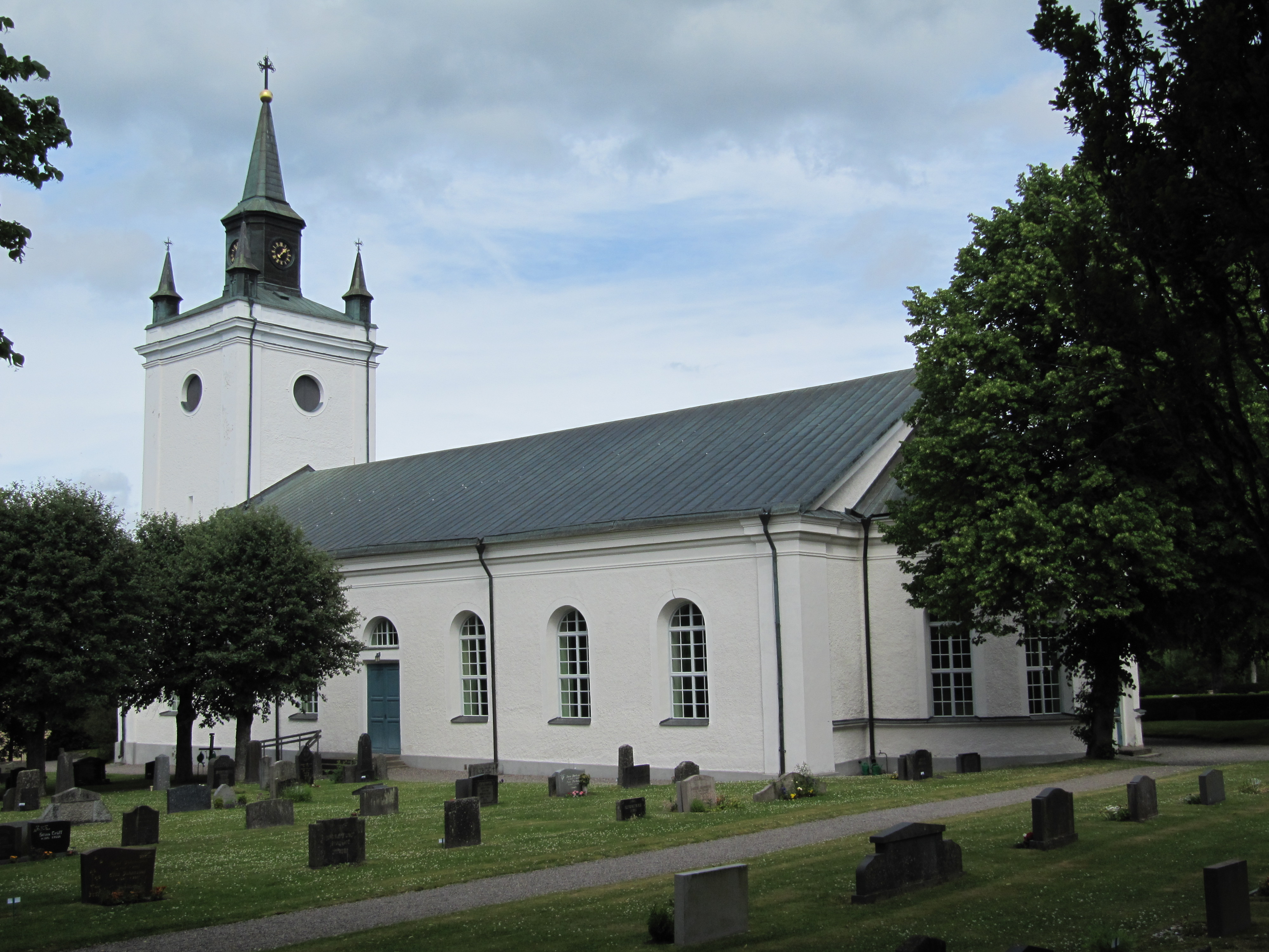 Hjälmseryds kyrka